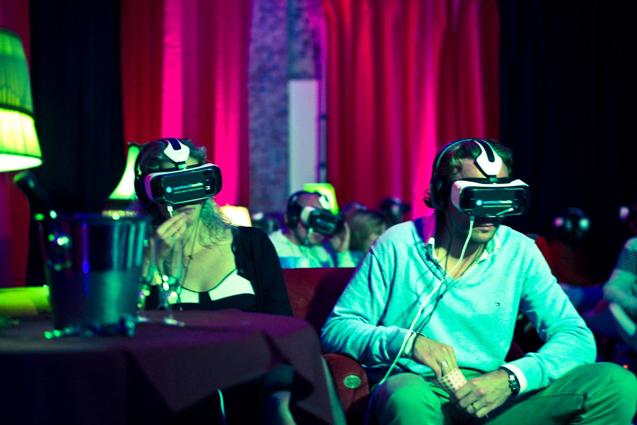 Una de las primeras experiencias virtuales europeas en Amsterdam, en el 2015.